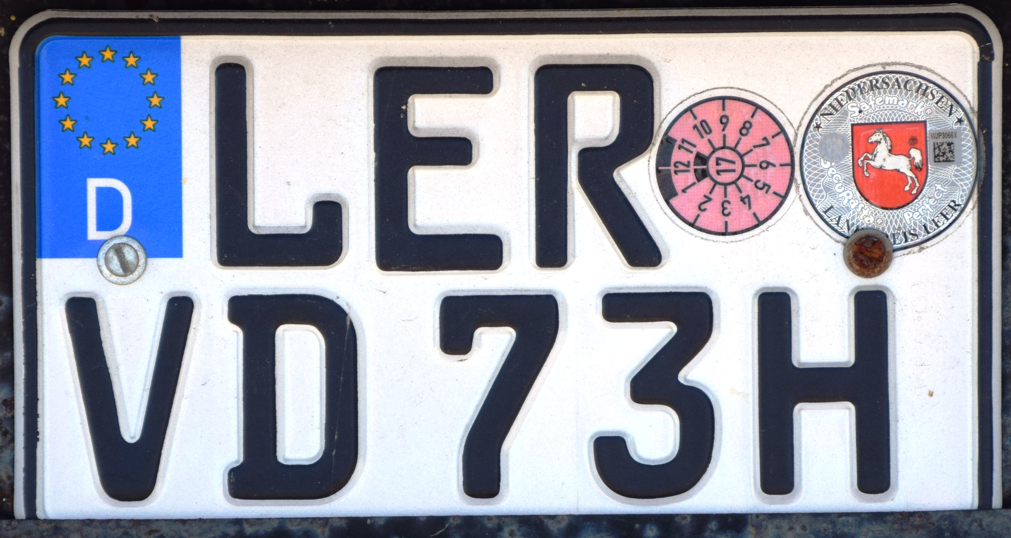 Kentekenplaat voor Oldtimers in Duitsland met een H op het eind.